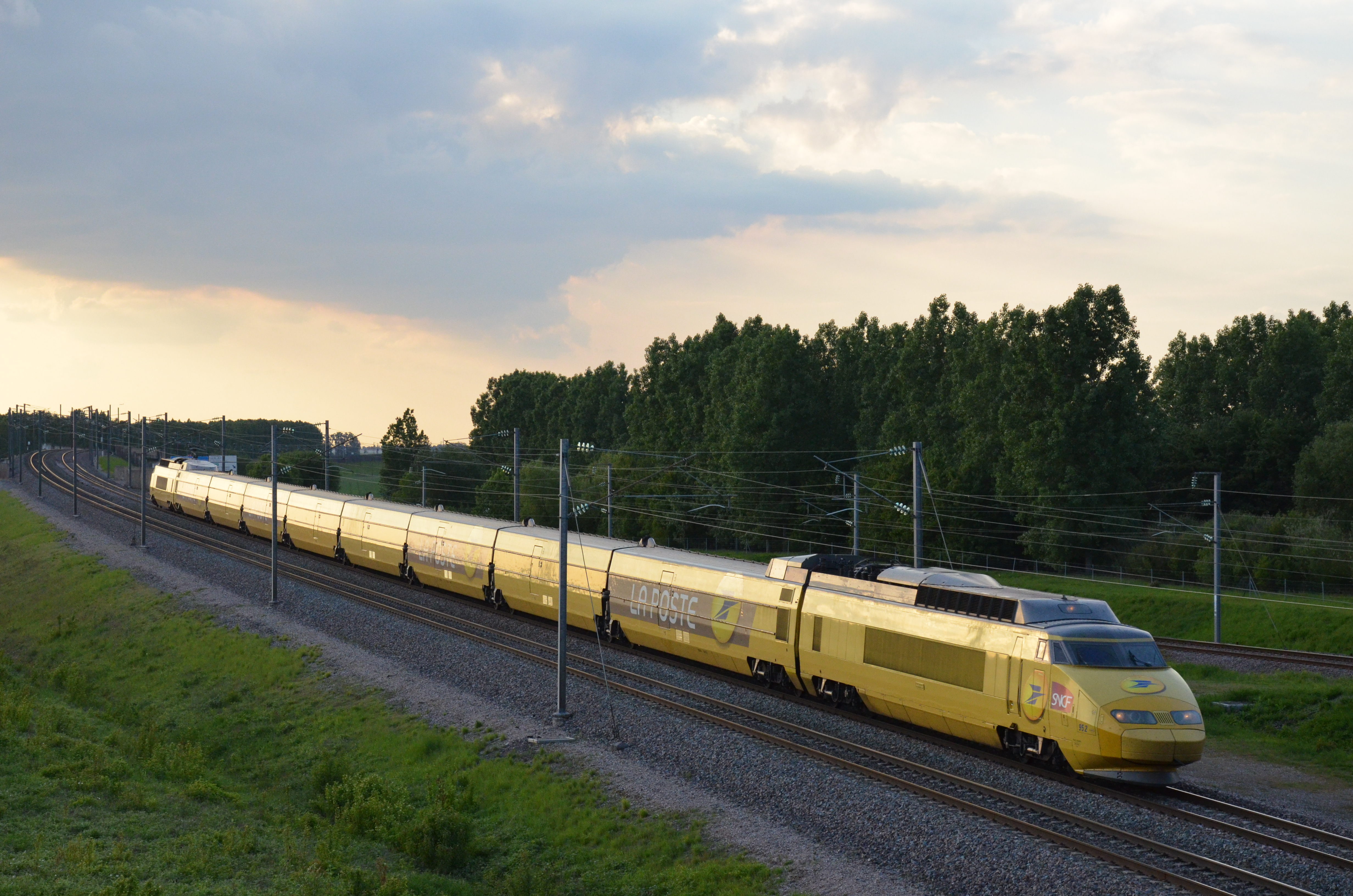 L'une des trois rames de TGV Postal à la bifurcation de Crisenoy, en direction de Cavaillon.